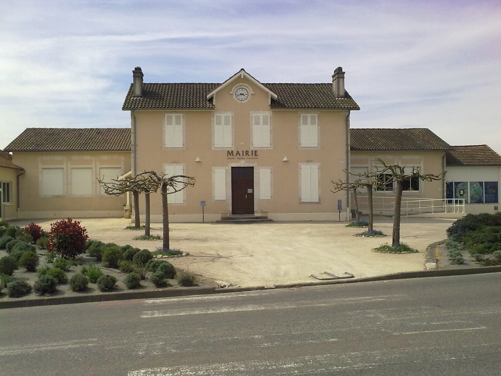 Uzein France Europe